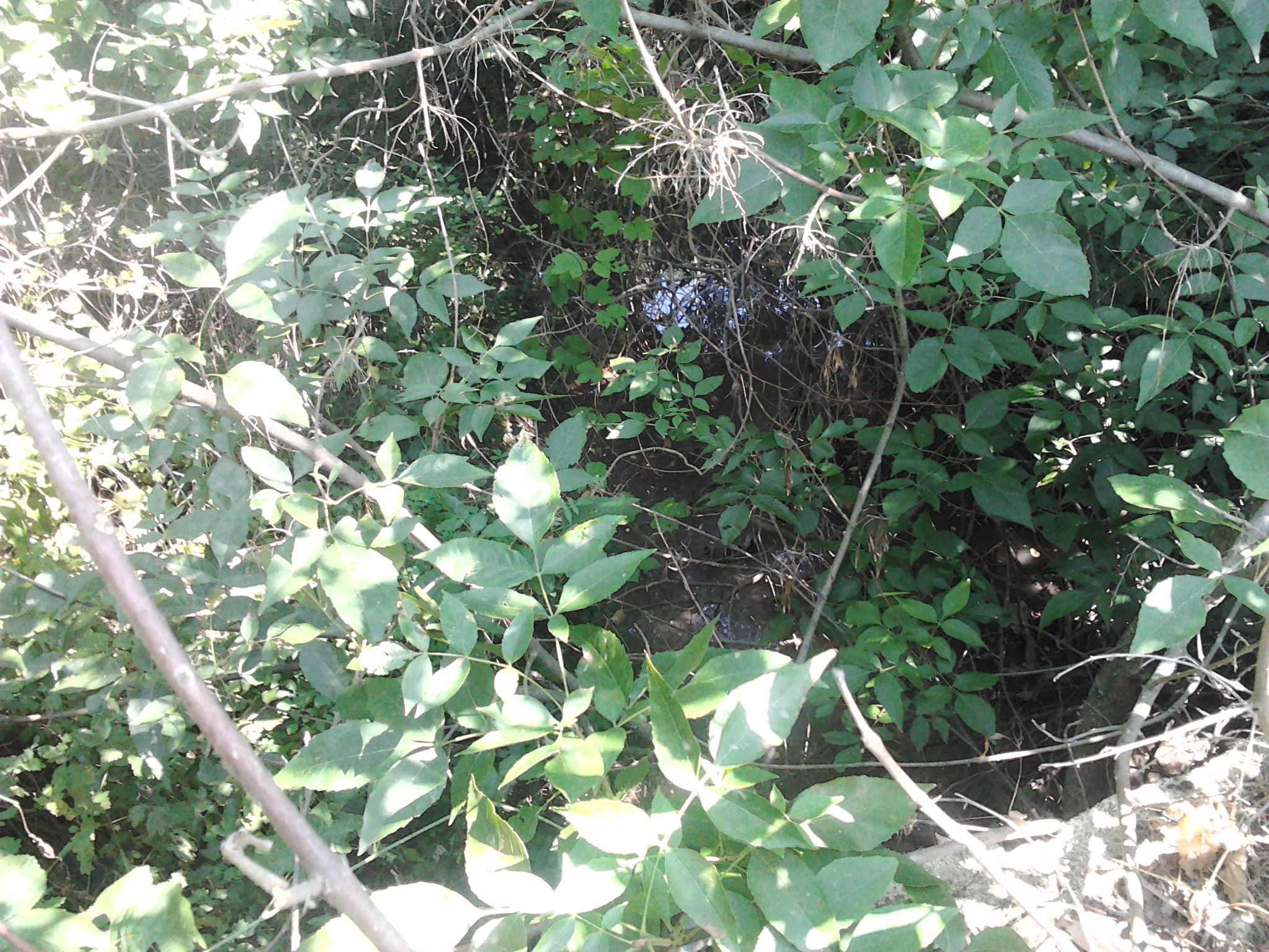 Az alacsony nyárközépi vízállásnál az Ostoros-patak vize épphogy előbukkan a part mentén burjánzó növénytakarótól.